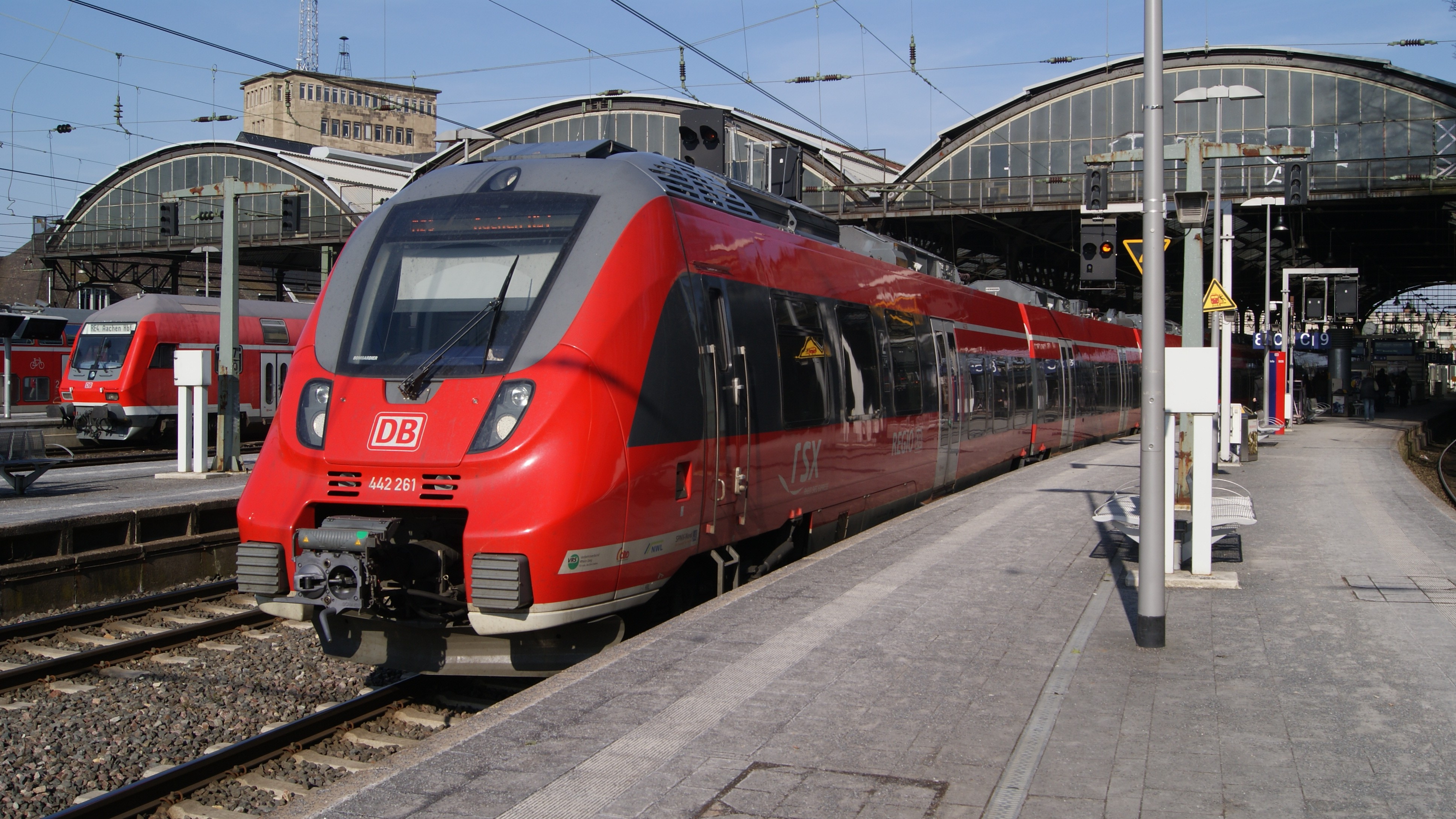 Talent 2-Triebzug (BR 442) von DB Regio NRW im Einsatz auf dem Rhein-Sieg-Express (RSX, RE 9) nach der Ankunft in Aachen Hbf.